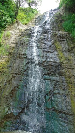 ابشار همیشگی با ارتقاع زیاد